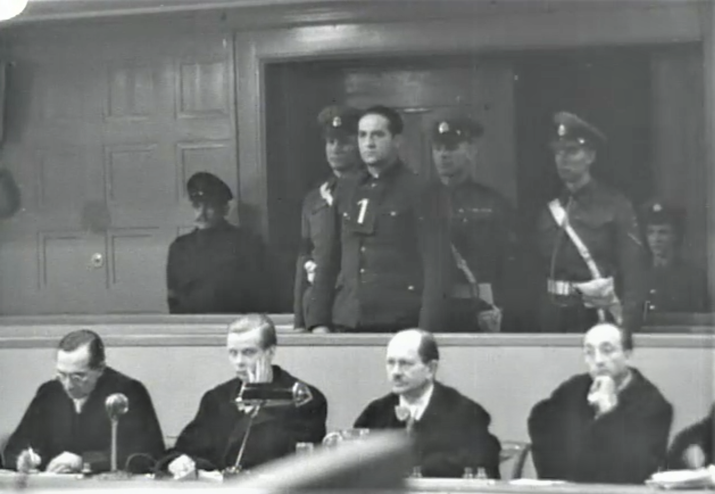 Johann Schwarzhuber (1904-1947), 1st Ravensbrück Trial 1947: The Sentencing